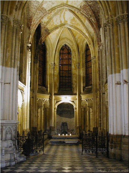 Lodz - Cmentarz Stary ul. Ogrodowa - Kaplica Scheiblerów